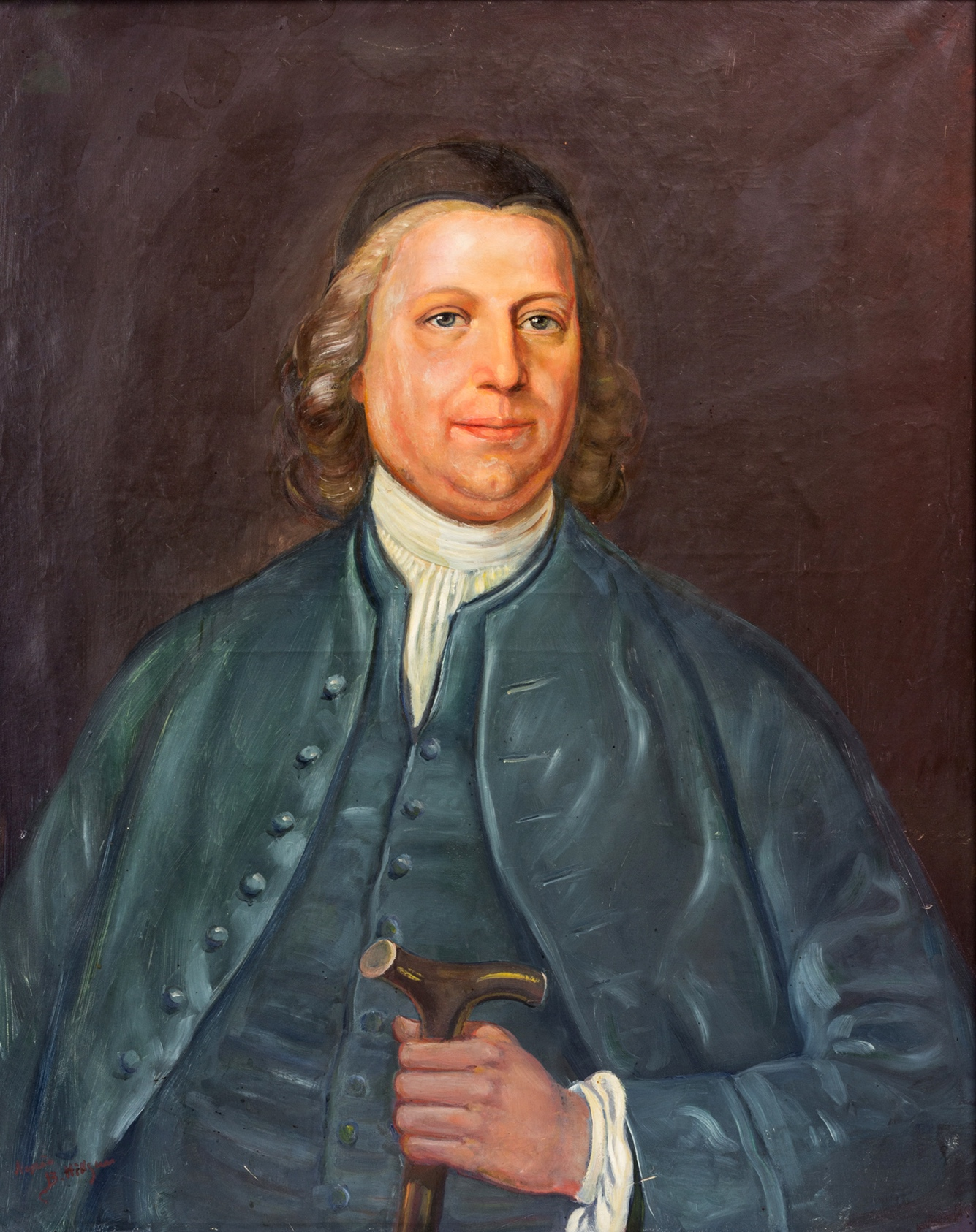 Porträtt av talmannen i bondeståndet Joseph Hansson (1708-1784), kopia av målning av Ulrika Pasch (1735-1796). Skapad av Bror Hillgren.